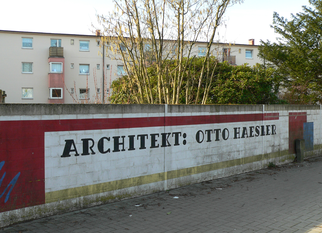 Siedlung Georgsgarten in Celle mit Block